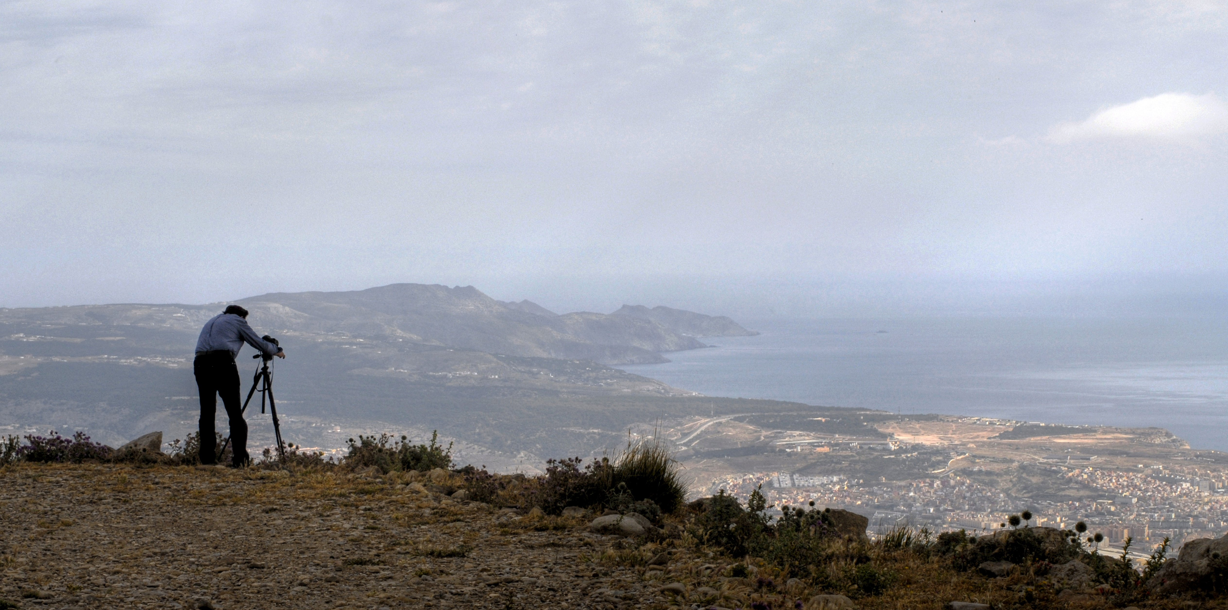 Desde la cima del Kol-La, divisando al fondo el cabo de Tres Forcas, debajo Melilla